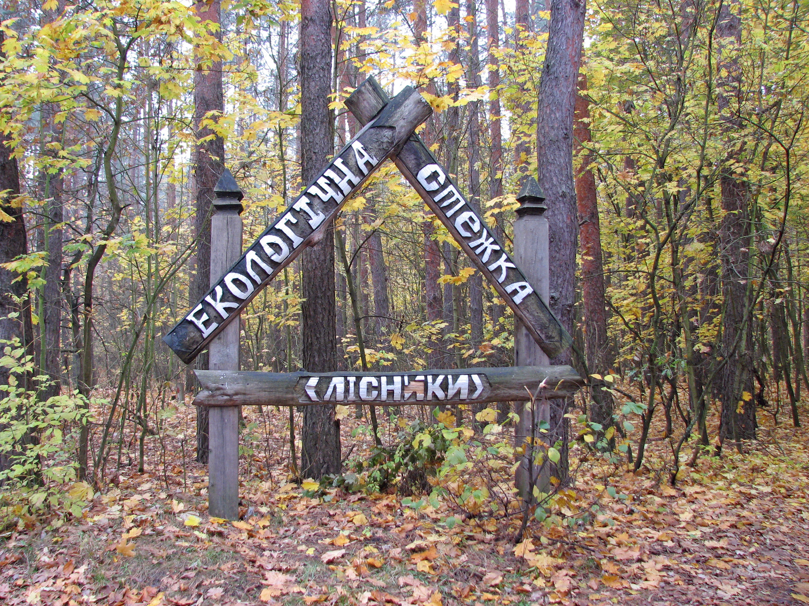 Лісники, Голосіївський район